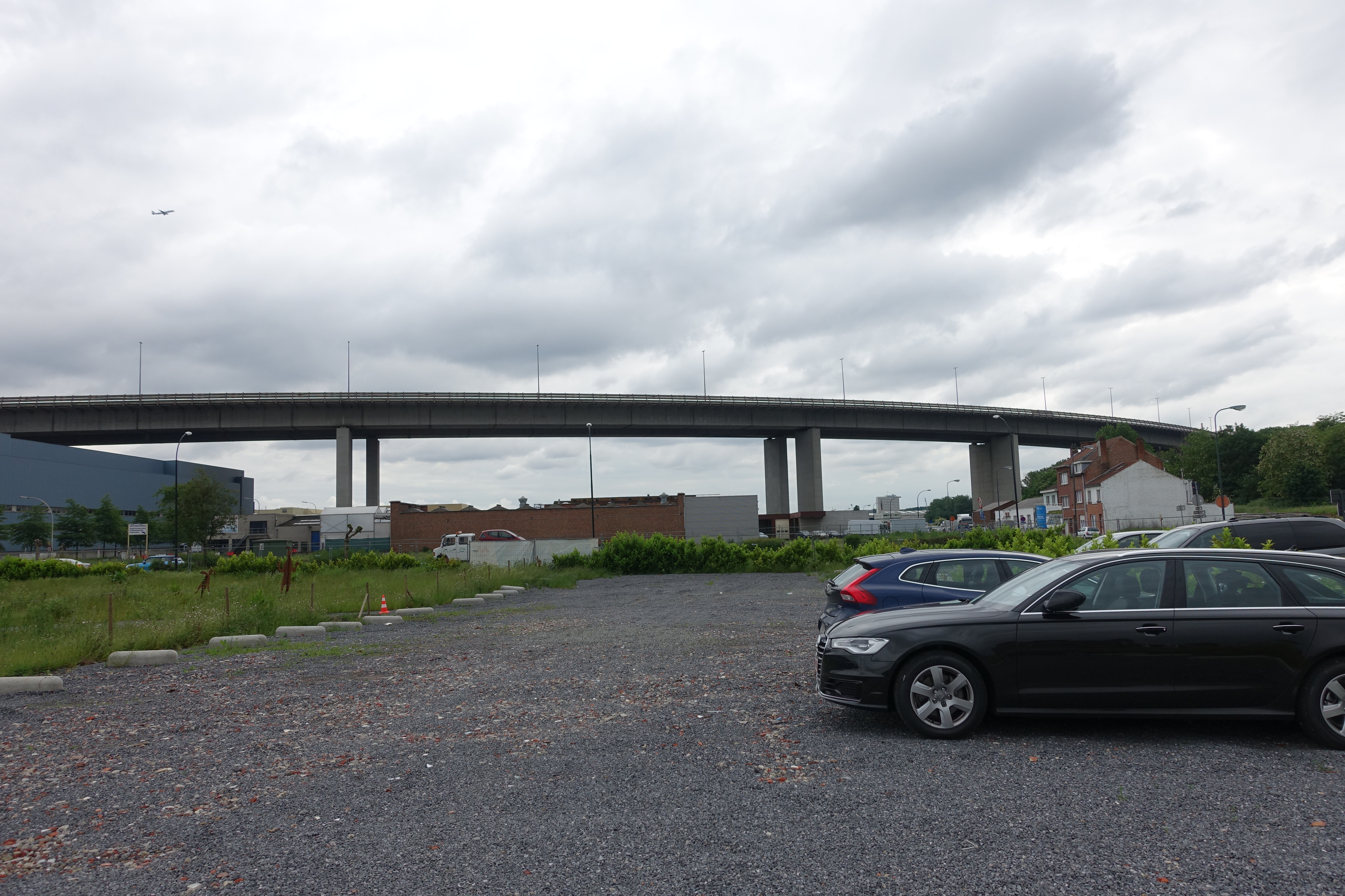 Zicht op de Viaduct van Vilvoorde vanaf het braakliggende terrein waarop de nieuwe wijk '4 Fonteinen' gebouwd zal worden, in de Vilvoordse wijk 'Broek'.